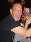 Deze foto is gemaakt op New Star Con IV (2005). Deze foto is zelf gemaakt.